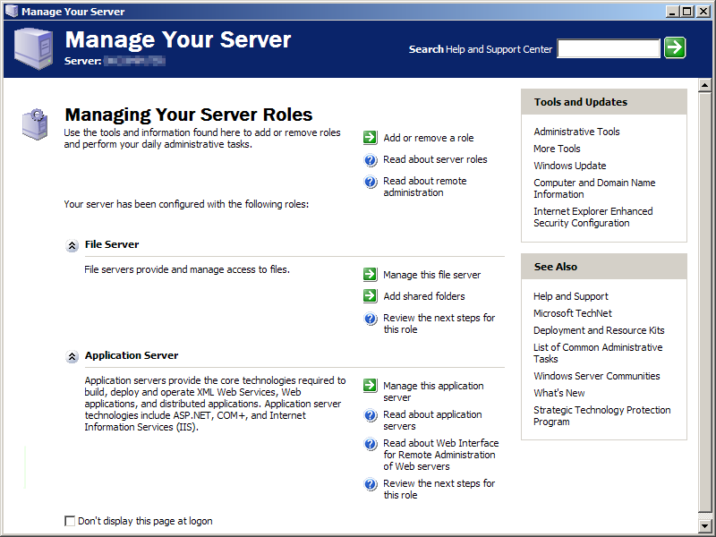 загальний вигляд